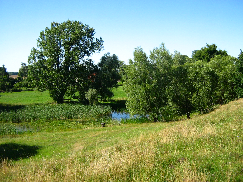 Stauzone am Fuß des Os bei Gatschow. Dieses Os bei ist eine eiszeitliche Sedimentation in Mecklenburg-Vorpommern; das hier abgebildete Os verläuft in Nordnordost-Südsüdwest-Richtung von Gatschow im Norden bis Zettemin im Süden im Landkreis Demmin in Vorpommern und ist das längste, mehr oder weniger zusammenhängende Os Nordostdeutschlands. Es verläuft parallel zur glazialen Rinne, bzw. an deren oberem Westrand, die heute das Stromtal des Augrabens bildet)